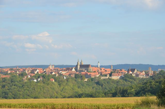 Panoramablick auf Rothenburg ob der Tauber von der Reutsächser Steige